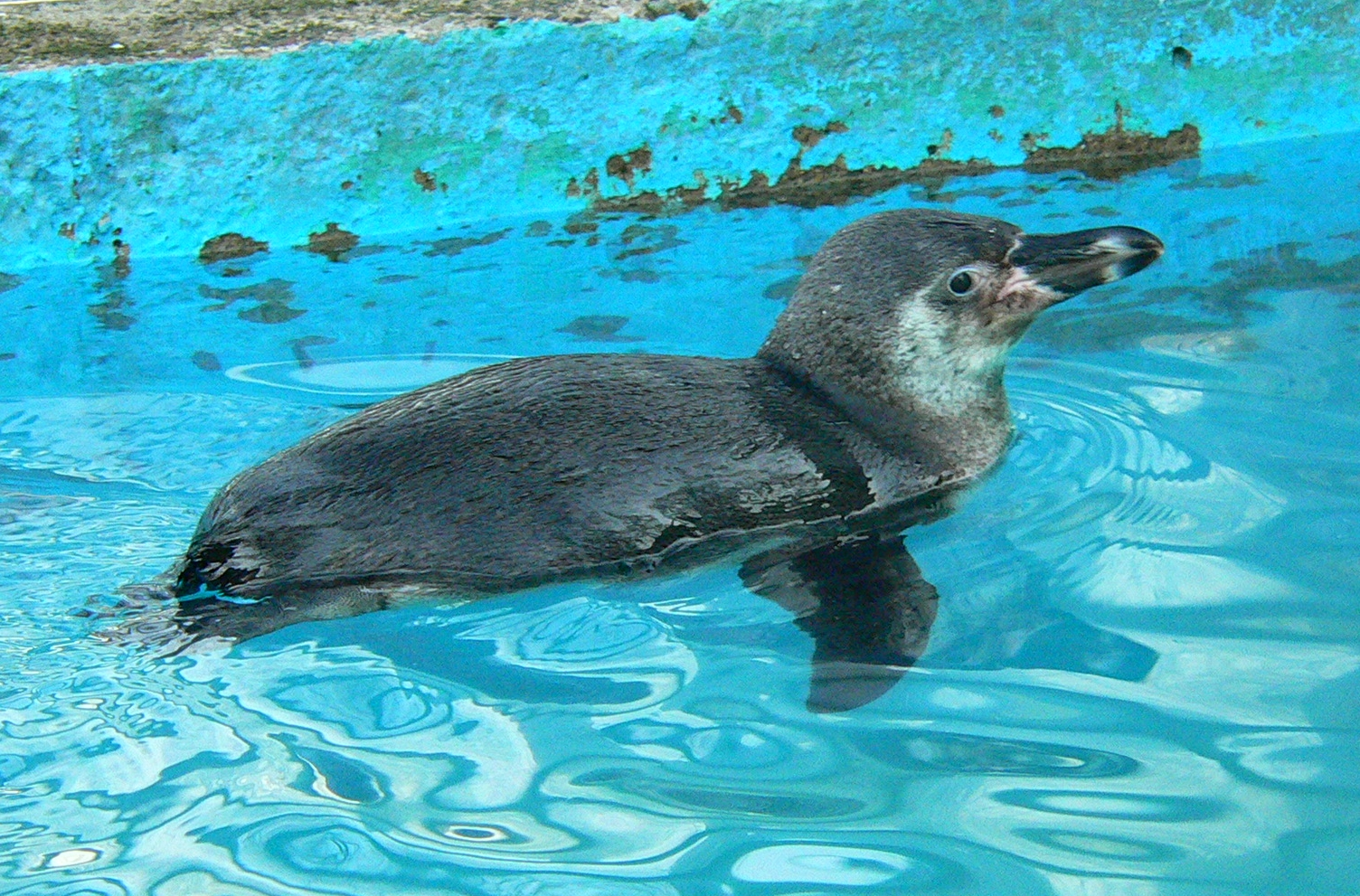 Im Tierpark Sababurg im Reinhardswald (Hessen), Humboldtpinguin